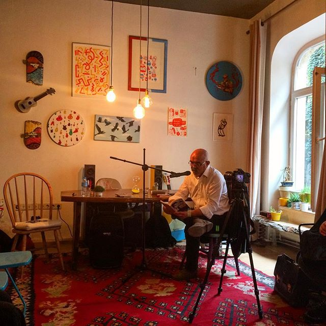 Ercan Kesal Bitti Gitti'deki Kitaplar Güzeldir gününde Peri Gazozu'ndan okuma yaparken.